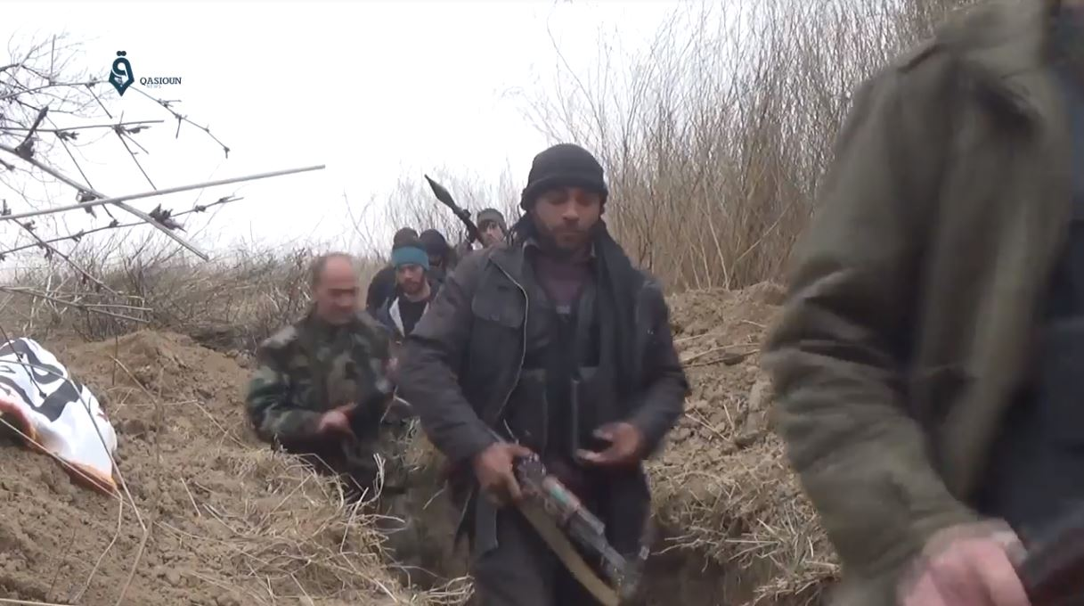 Rebelles de Jaych al-Islam à al-Marj, dans la Ghouta orientale, lors de la guerre civile syrienne, le 13 février 2017.